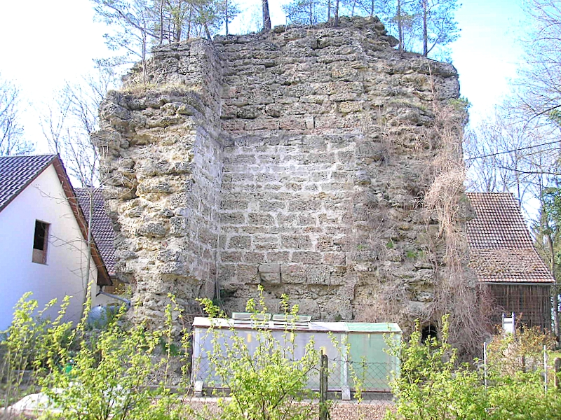 Burg Wolfsberg über Steinekirch (Markt Zusmarshausen, Landkreis Augsburg, Bayerisch-Schwaben). Die Ruine des Bergfriedes. Eigene Aufnahme, April 2008 / Wolfsberg castle near Steinekirch (Zusmarshausen near Augsburg, Germany). The ruins of the keep. Own photo, April 2008